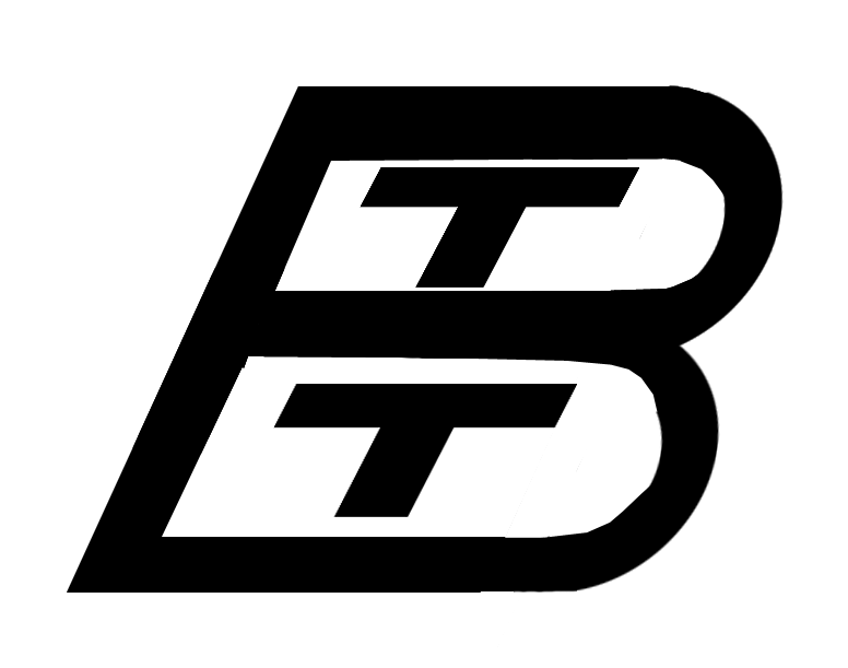 Логотип ВРТТЗ